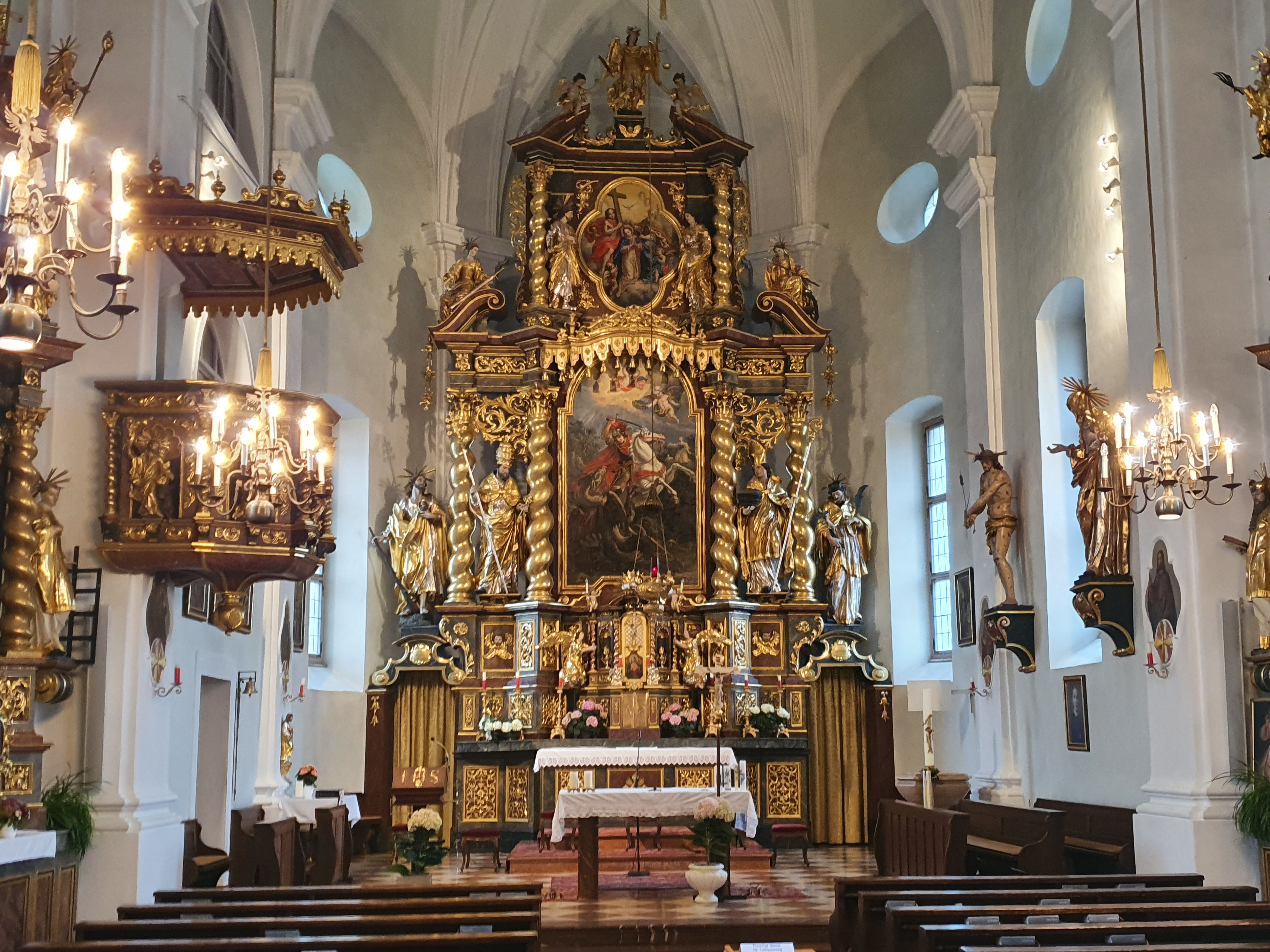 Der Hochaltar im Chor wurde vom Salzburger Tischler Lorenz Windpichler 1705/1706 geschaffen.